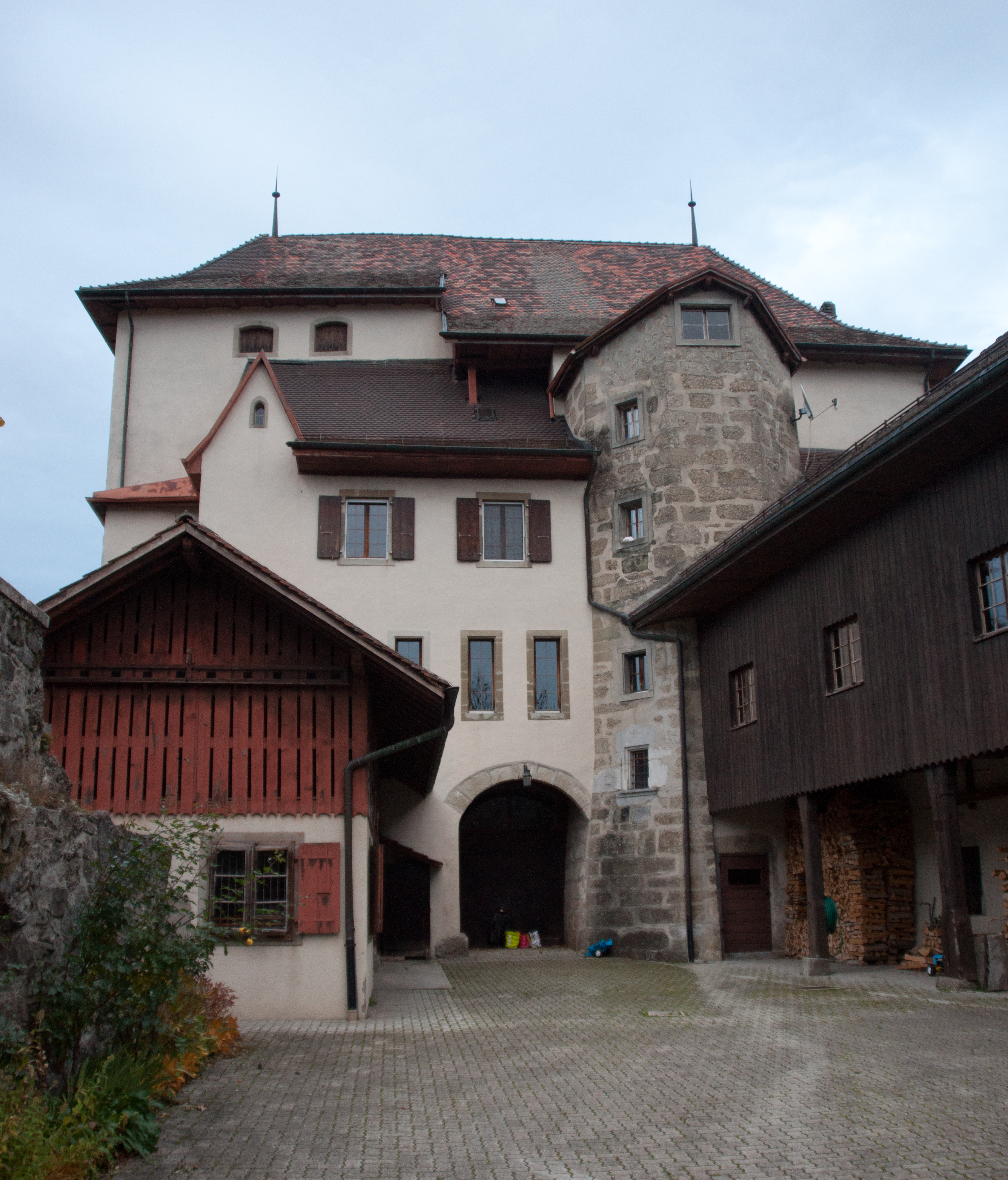 Le Château d'Attalens, dans le Canton de Fribourg en Suisse.